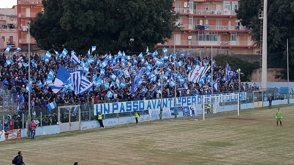 La curva Anna, Stadio Nicola De Simone, Siracusa